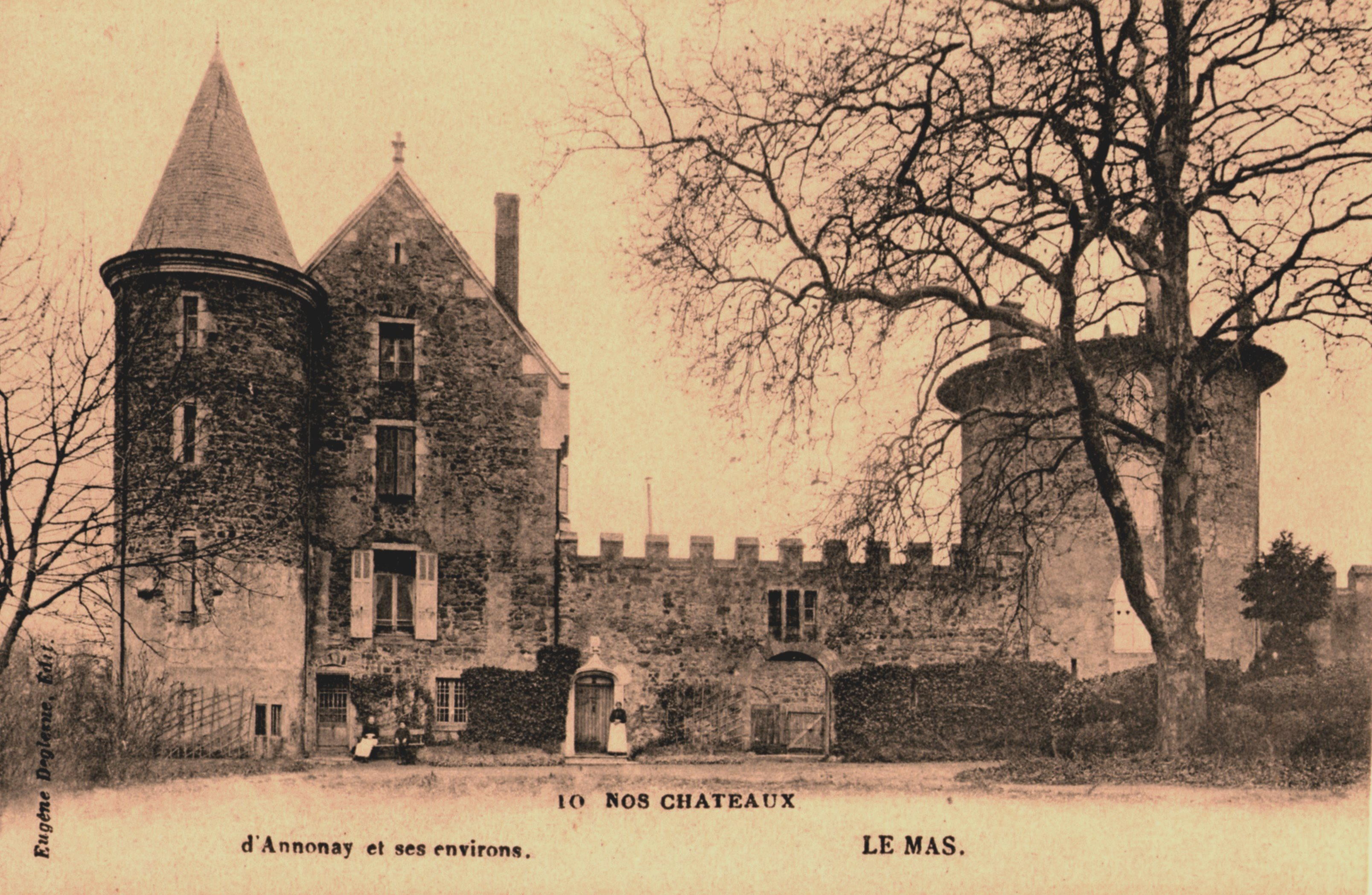 Davézieux le Mas